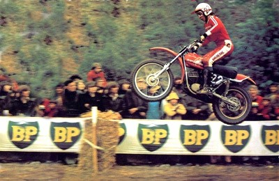 Seizoen 1974 op Zündapp